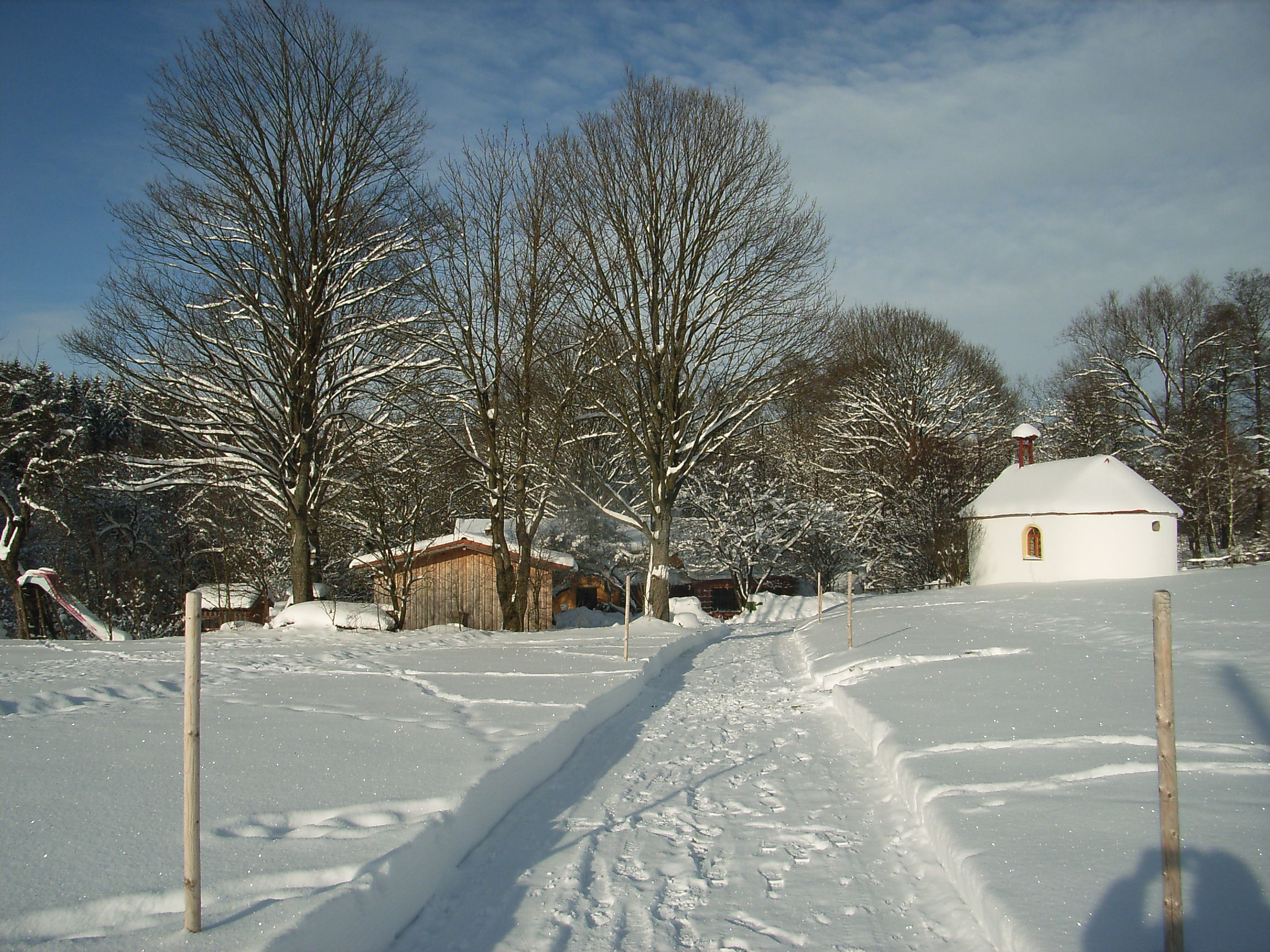 Sägmühle im Winter (2012)